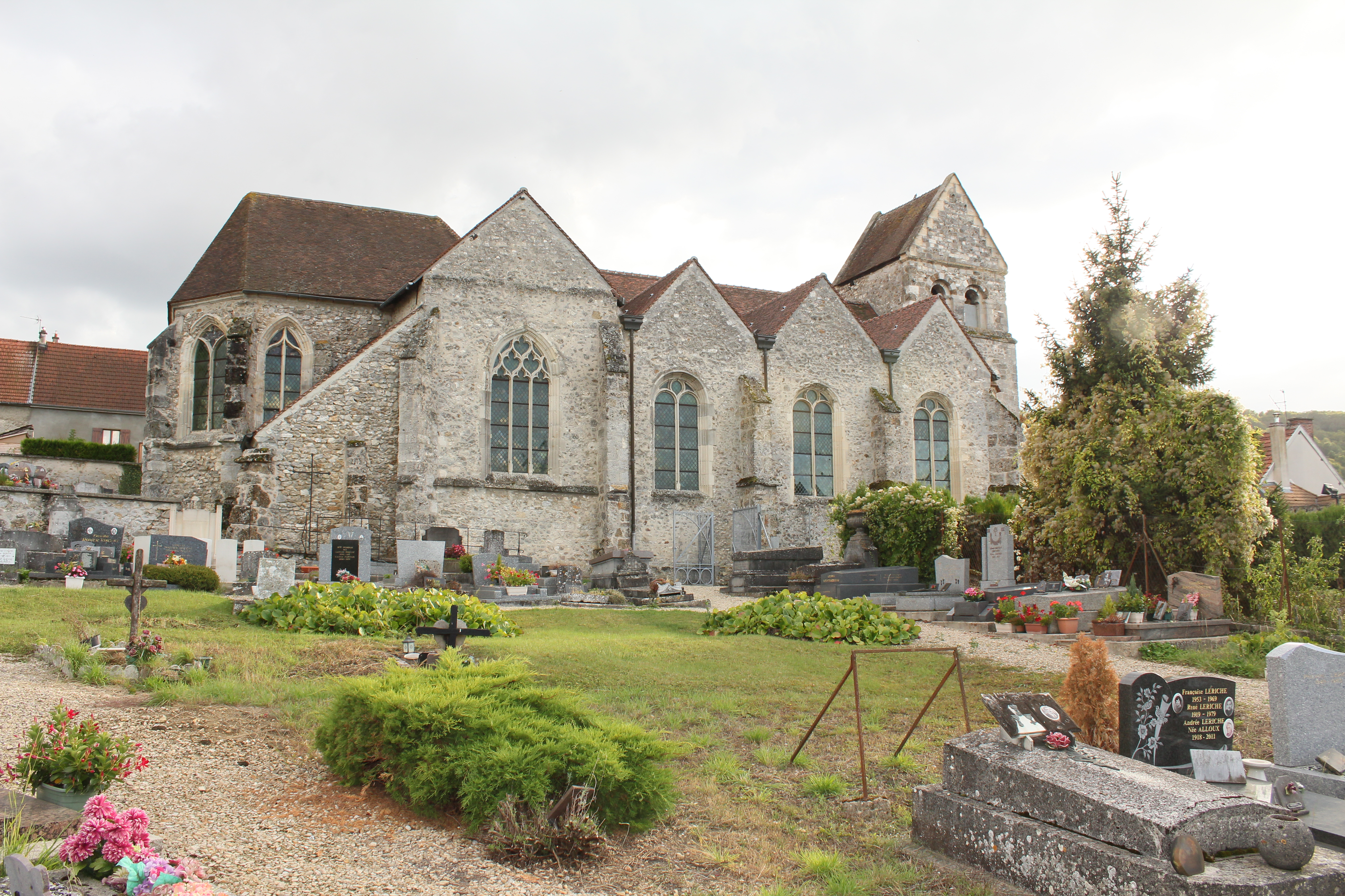 Église Saint-Memmie d'Œuilly, (Classé, 1923) .